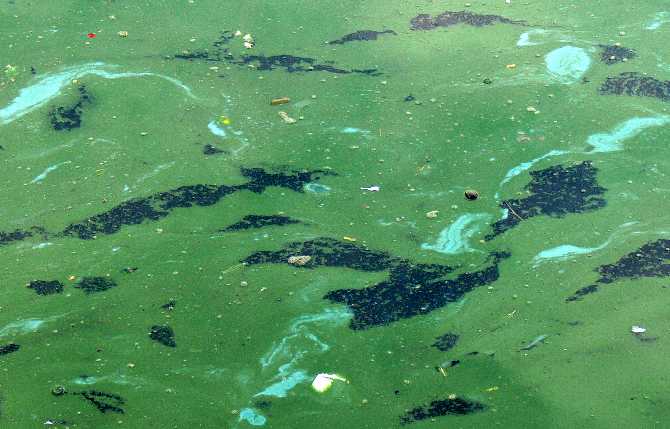 Inflorescence planctonique. Ce sont a priori des cyanophycées (algue bleue). Dans ce cas, au début de l'épisode, près des berges ou là où le vent en provoque des accumulation, on distingue d'abord des taches vertes, puis quelques taches bleues (zones d'accumulation de pigments bleus libérés par des bacéries mortes), qui après quelques heures se font plus nombreuses. Lieu : quai du Vault à Lille (France), après une longue période pluvieuse. Le canal proche est également couvert d’une couche de plancton vert, moins épaisse.